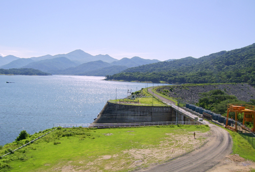 Panorámica de la Presa Cajón de Peñas